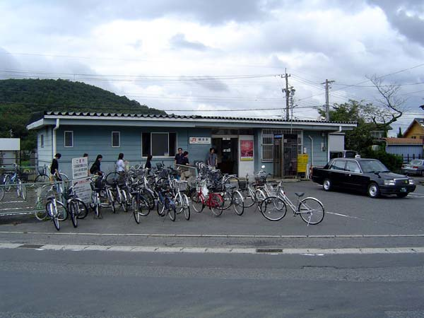 JR東海太多線 根本駅駅舎 2004年9月6日投稿者（Kone）が撮影